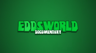 Abertura de Eddsworld Legacy